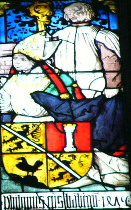 Fenster des Bischofs von Bamberg: Darstellung von Philipp von Henneberg mit seinem fürstbischöflichen Wappen